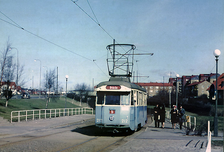 Spårvagn vid hållplatsen Vårvindsgatan på Bräckelinjen i Göteborg 1967